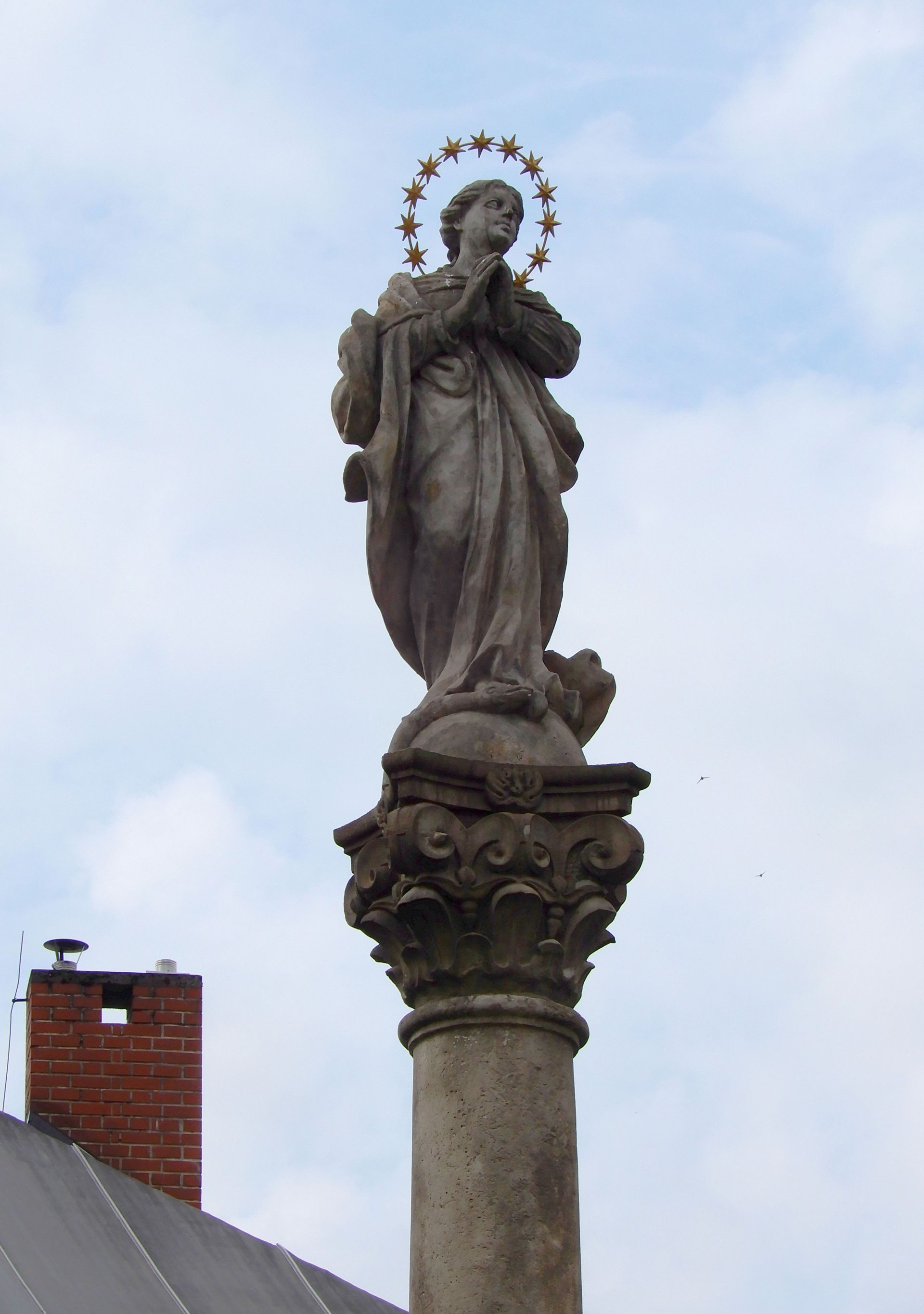 Vamberk, mariánský sloup - detail sochy Panny Marie Immaculaty